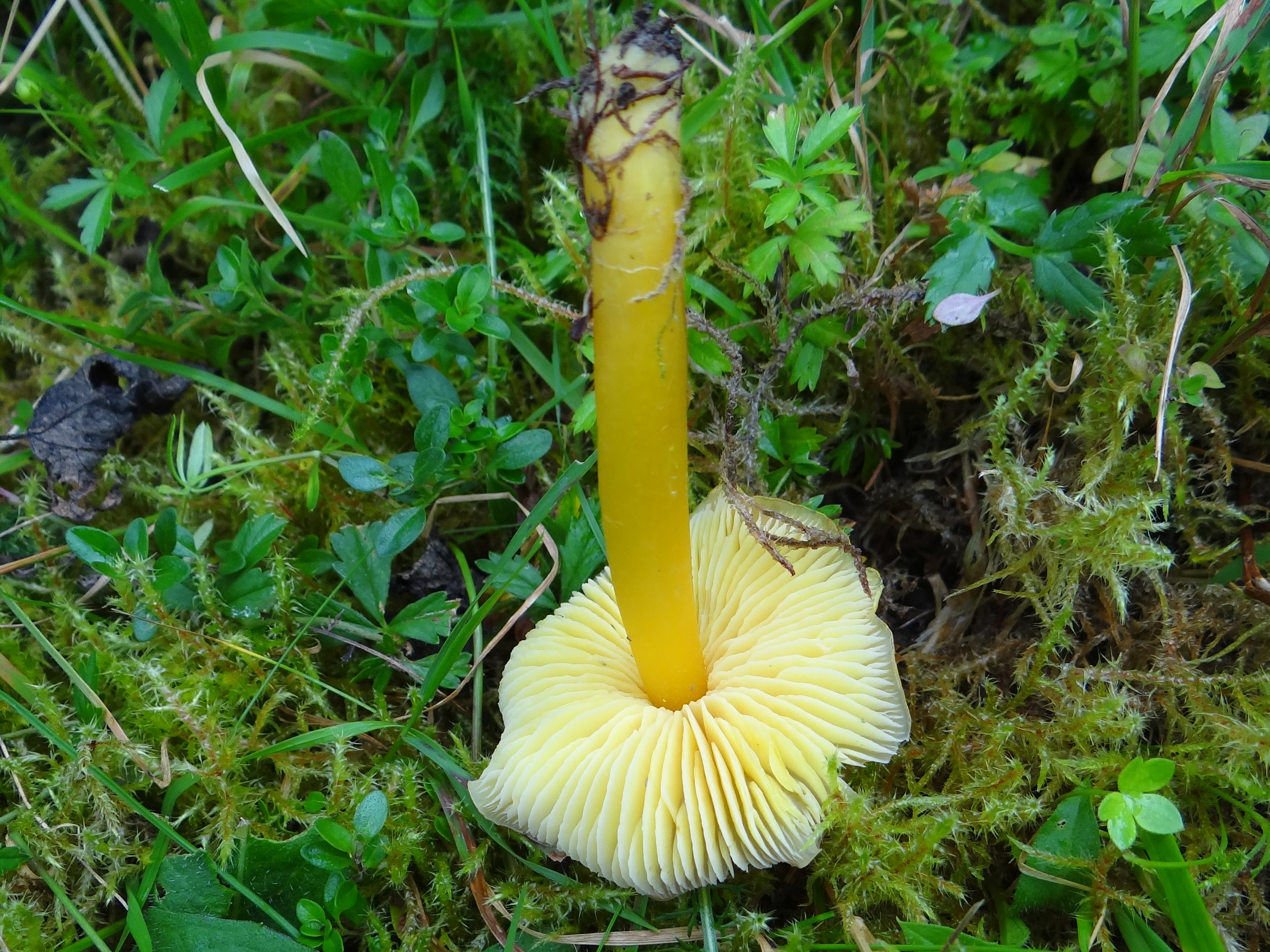 Hygrocybe acutoconica (location: Slovakia, Magura Spiska, Jezersko)